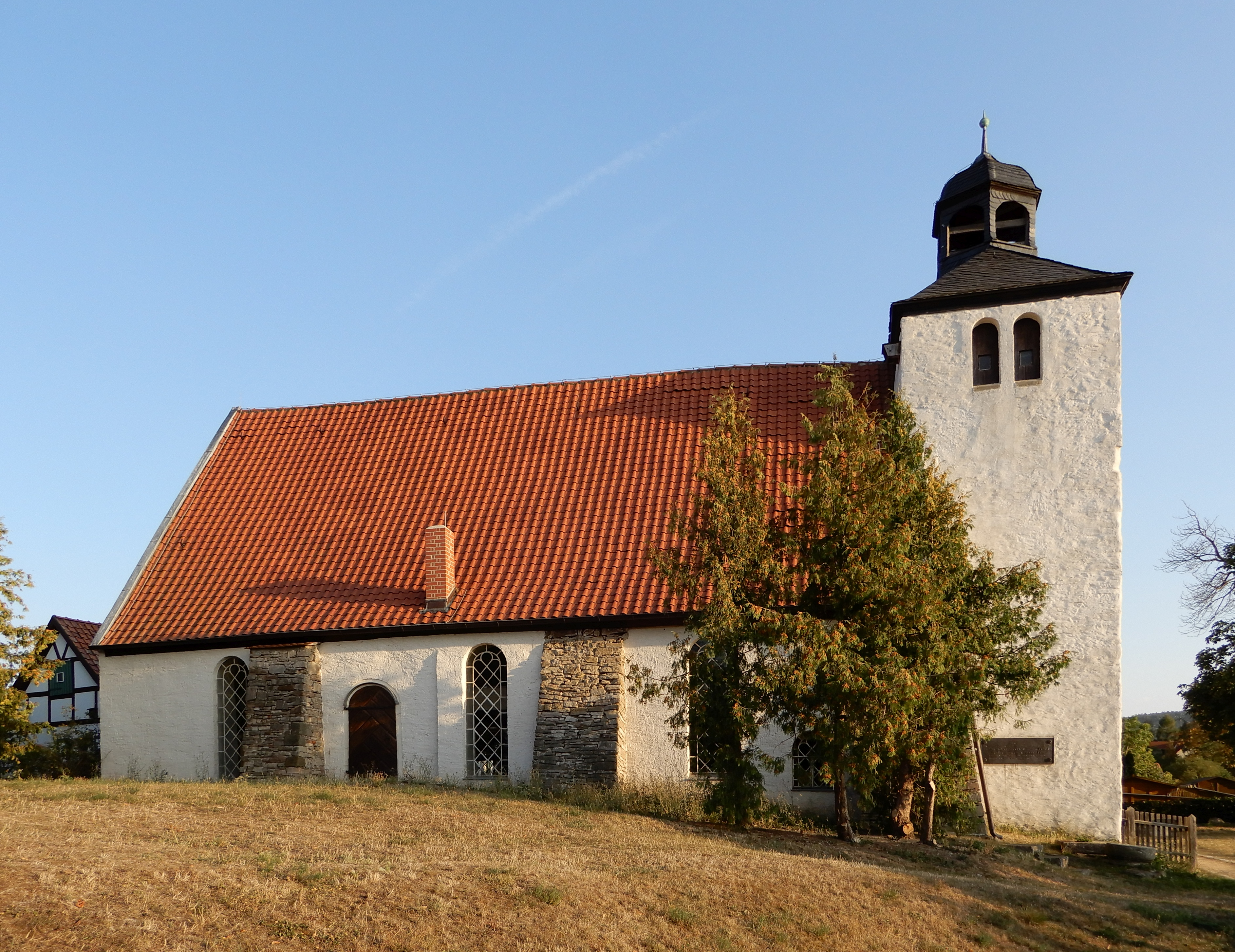 Kirche St. Katharinen (Neinstedt)